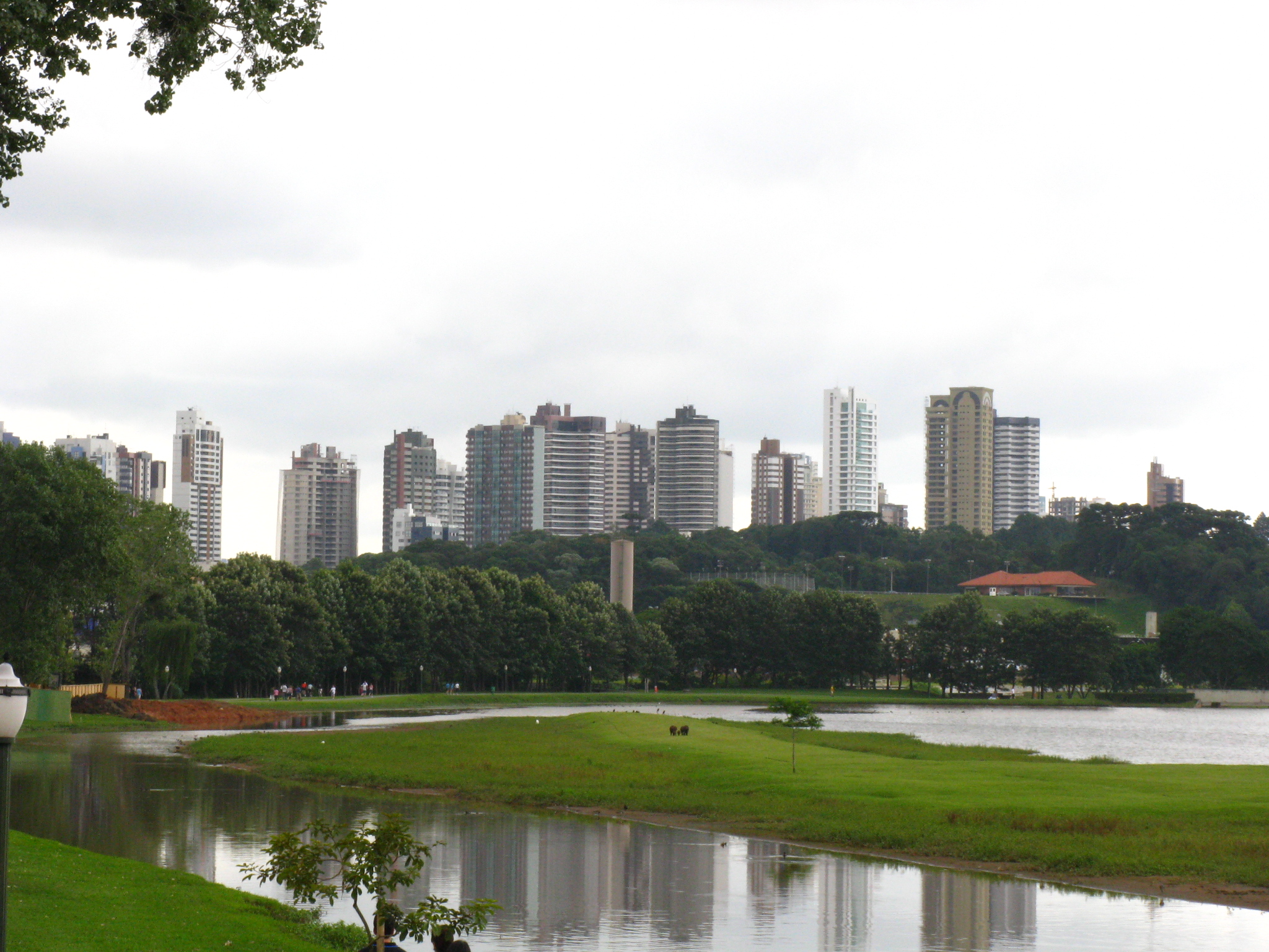 Curitiba From Barigui Park